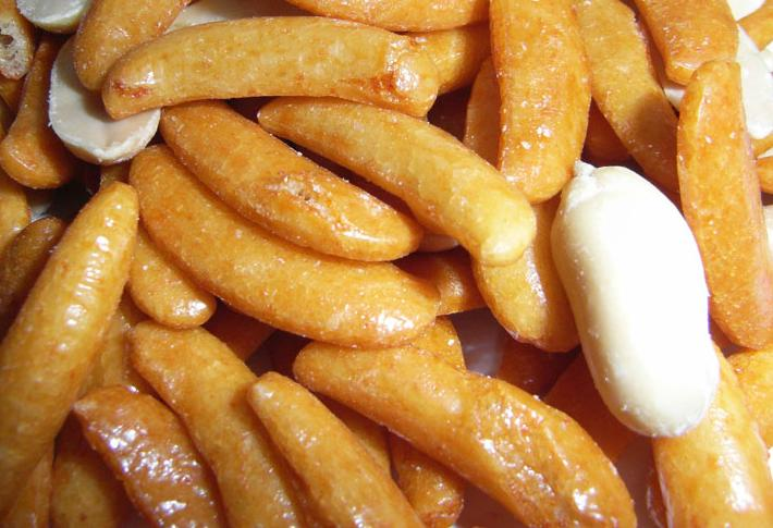 Japanese snack food, Kaki-pi